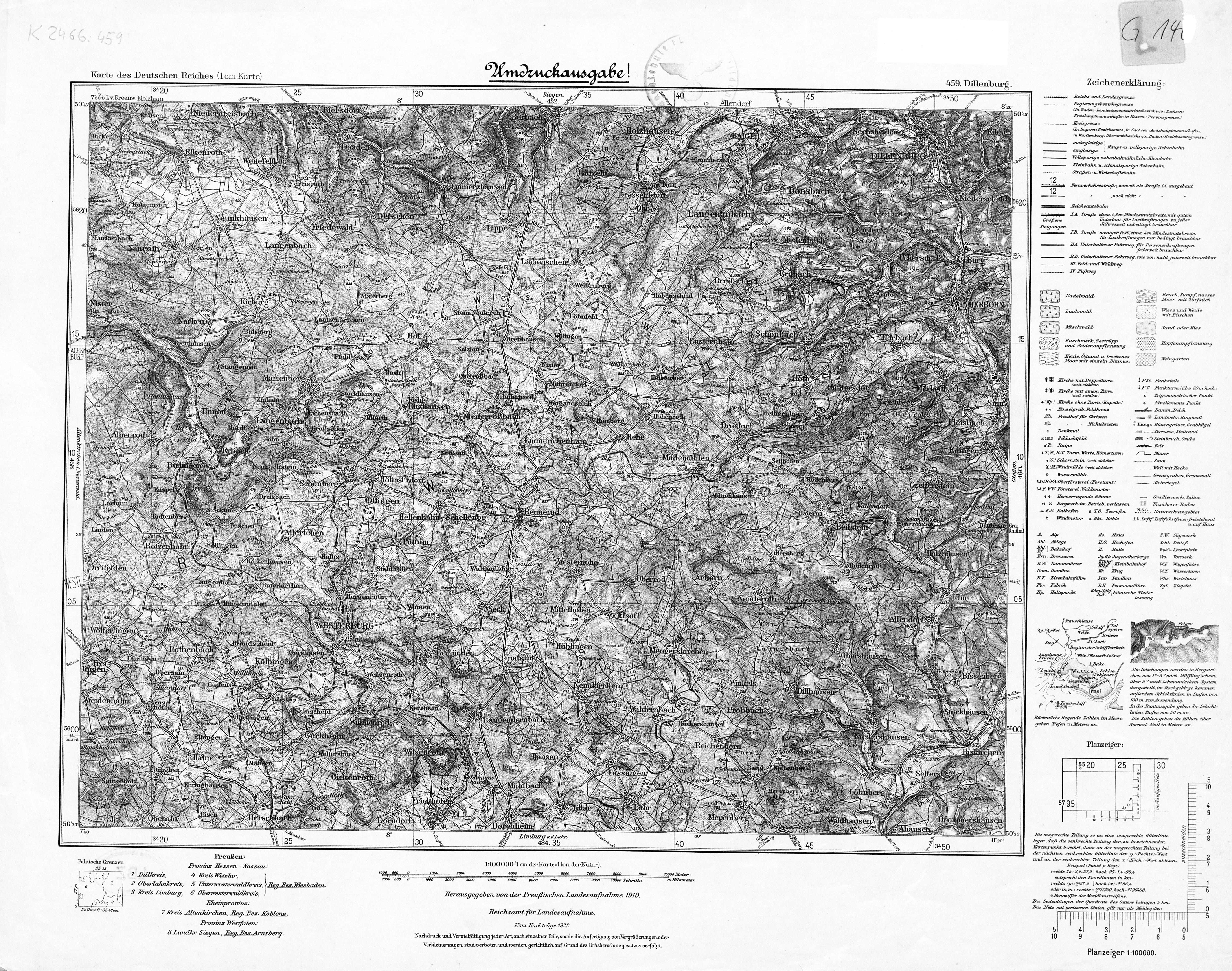 In: Karte des Deutschen Reiches/ hrsg. von der Kartogr. Abtheilung der Königl. Preuss. Landes-Aufnahme. Berlin, 1890. 1933; [Electronic ed.] Koblenz : Landesbibliothekszentrum Rheinland-Pfalz, 2010.